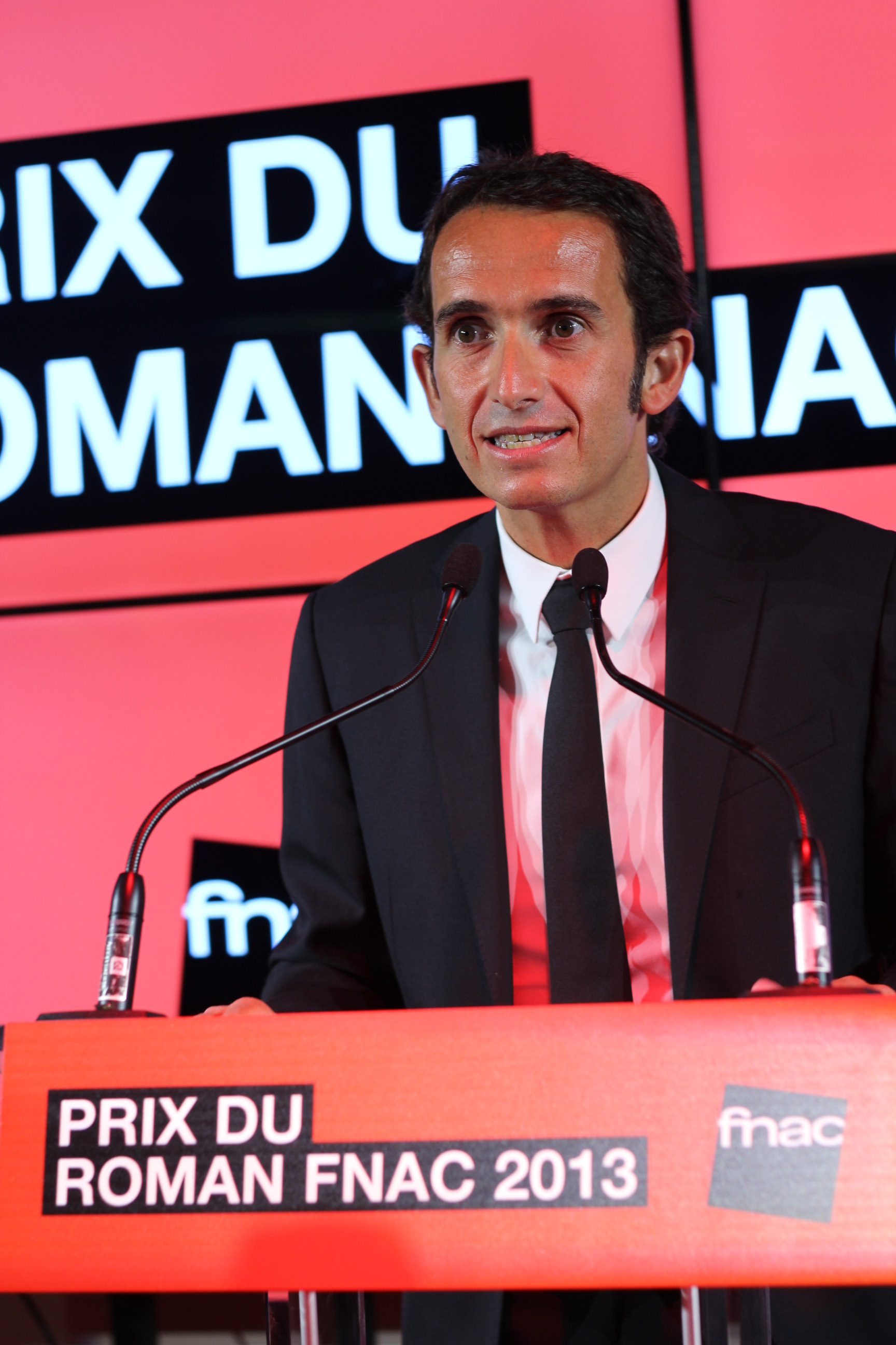 Alexandre Bompard, PDG de la Fnac, au Prix du Roman Fnac 2013. Le jeudi 29 août au Théâtre du Châtelet. Article ici : Alexandre Bompard, PDG de la Fnac, au Prix du Roman Fnac 2013